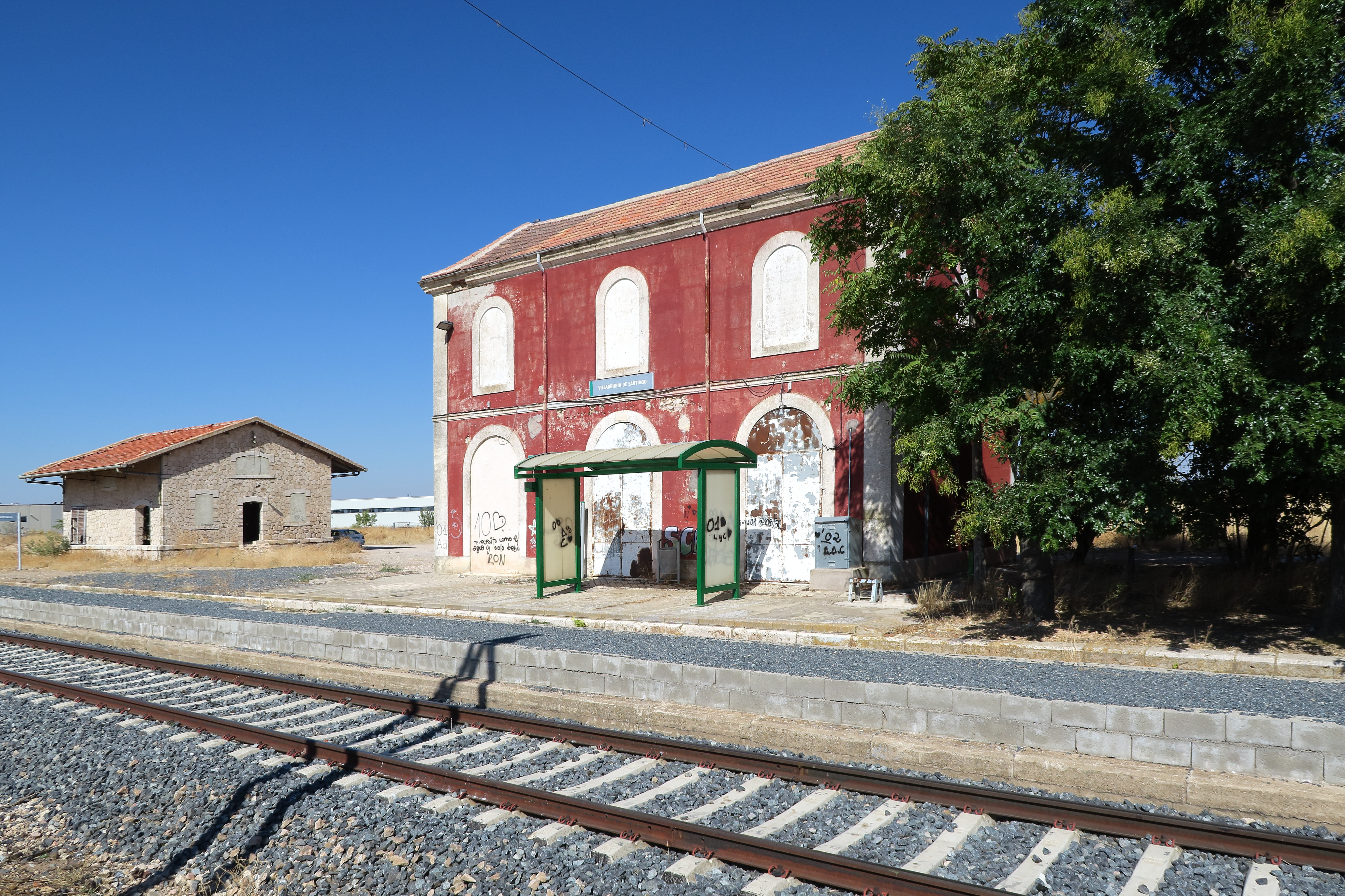 Antigua estacion de Villarrubia de Santiago